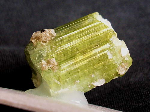 turmalin verdelit, pochodzenie Brazylia; autor zdjęcia Stowarzyszenie Spirifer